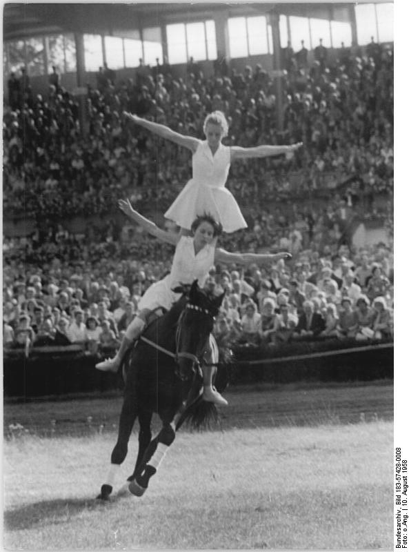 Berlin, Reitturnier, Voltigieren Zentralbild Ulm-Wen 10.8.1958 Großer Preis der DDR in Karlshorst Am 10.8.1958 wurde in Berlin-Karlshorst der "Große Preis der DDR" im Zuchtrennen über 2600 m gestartet. Sieger dieses Rennens wurde der 10jährige Bonekamp mit H. Schilling im Sulky vom VB-Gestüt Prieros von Ethalon und Stella-magis.UBz. Zwischen den Rennen zeigte unter anderem eine Kindervoltigierabteilung unter der Leitung von Hengstprüfmeister Lorenz auf dem Voltigierpferd Famur ihr Können.